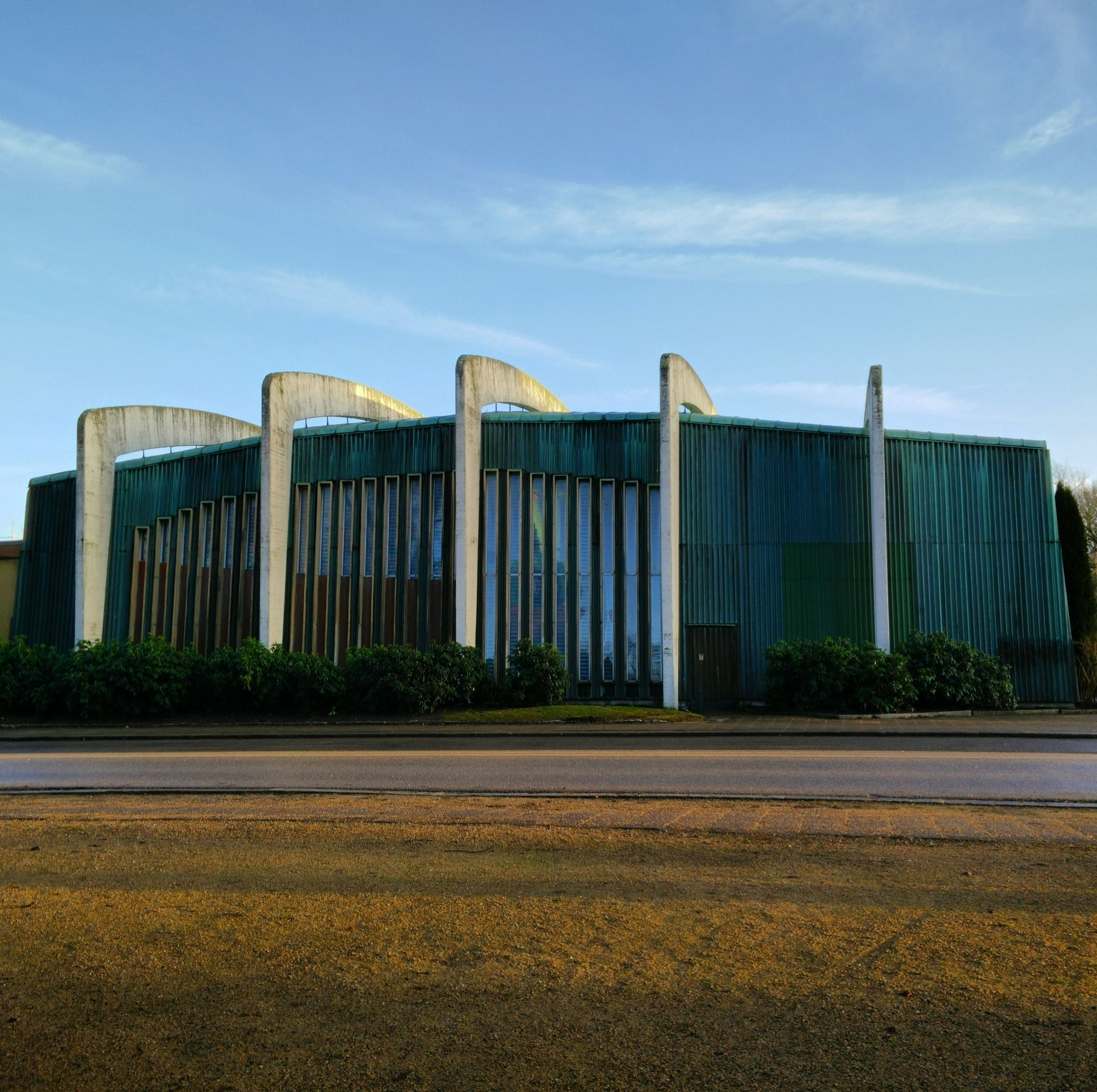 Gamla Huvudnässkolans aula 2016. Skolan har rivits men aulan står kvar. Ritad av Åke Wahlberg.